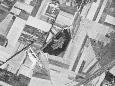 Fort II Twierdzy Poznań sfotografowany przez satelitę KH-4A 1023, 23 sierpnia 1965 r.